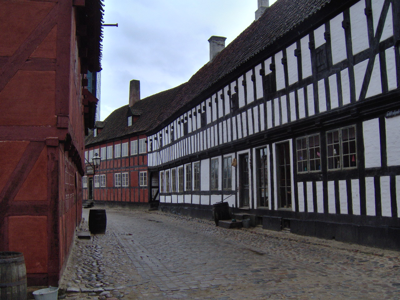 den-gamle-by-19